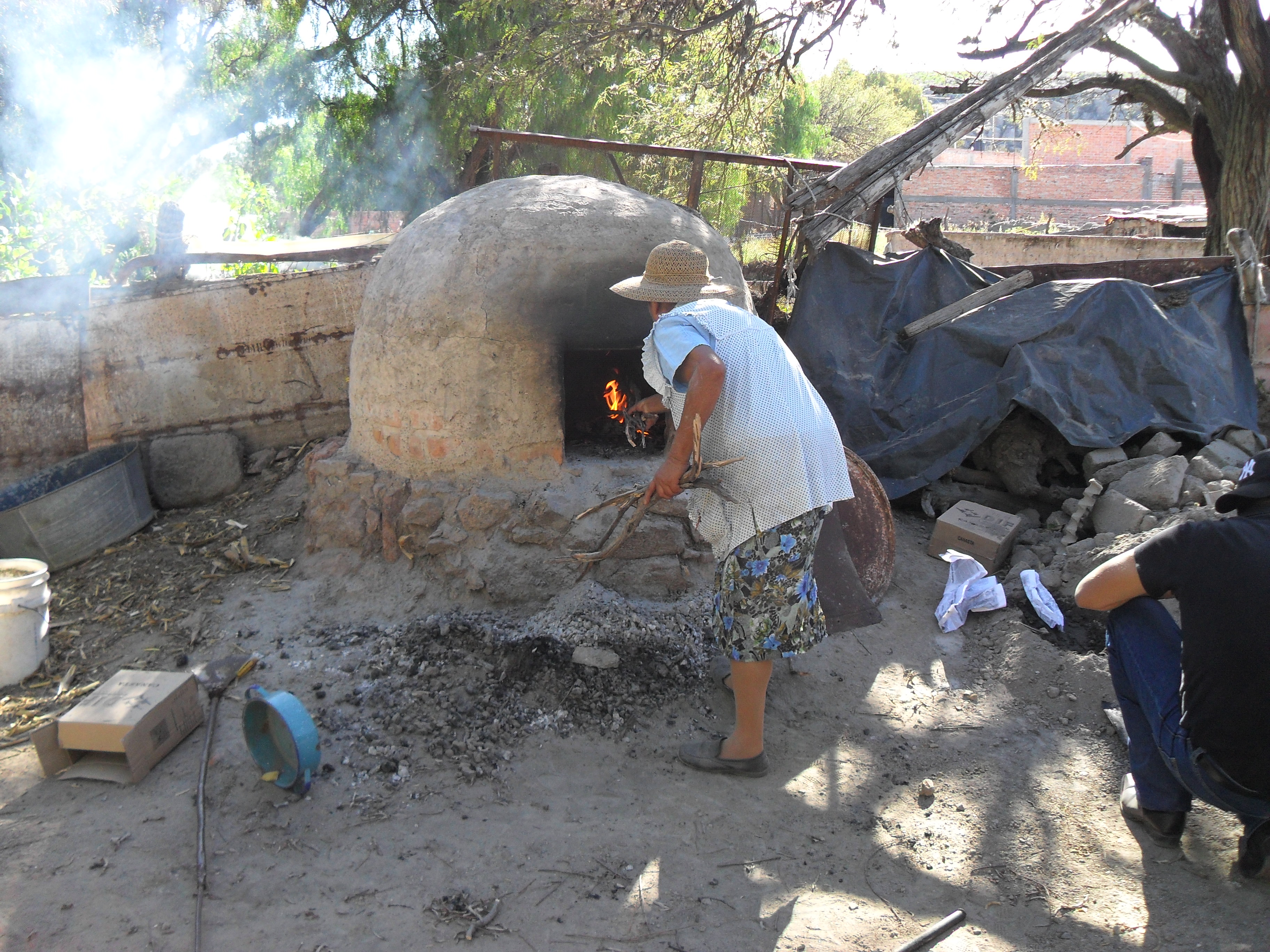 mujer preparando alimentos típicos del día de muertos en el Lobo, Loreto, Zacatecas.